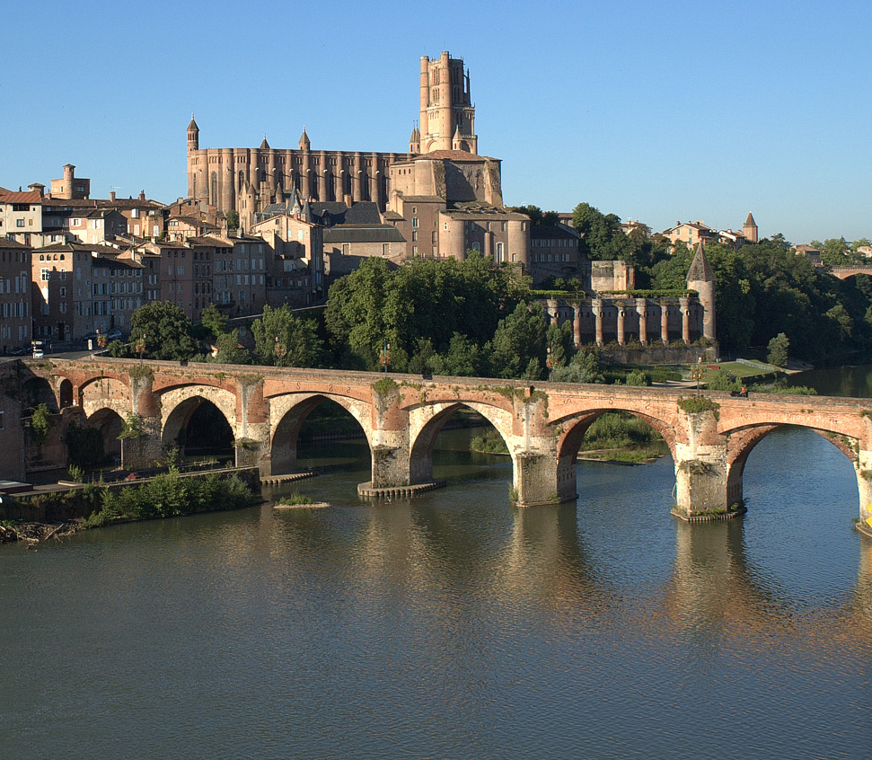 Vieux pont d'Albi